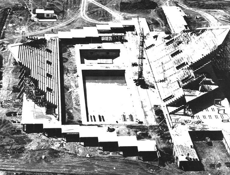 Luoghi dei VI Giochi del Mediterraneo di Tunisi 1967 - Piscina olimpica e palazzo dello sport El Menzah in costruzione